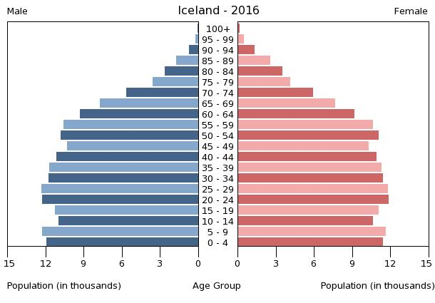 A population pyramid illustrates the age and sex structure of a country's population and may provide insights about political and social stability, as well as economic development. The population is distributed along the horizontal axis, with males shown on the left and females on the right. The male and female populations are broken down into 5-year age groups represented as horizontal bars along the vertical axis, with the youngest age groups at the bottom and the oldest at the top. The shape of the population pyramid gradually evolves over time based on fertility, mortality, and international migration trends.